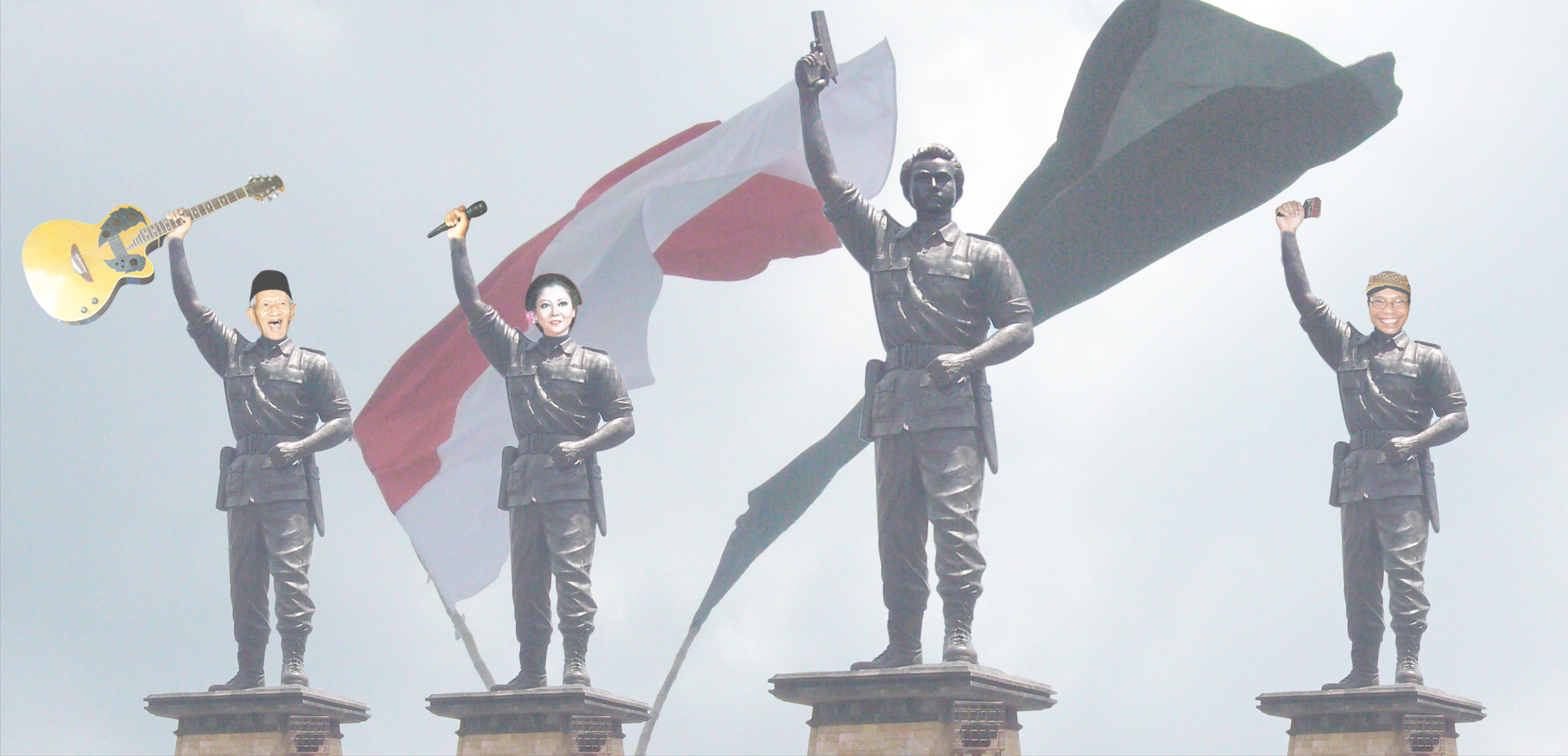 DIpamerkan 2009 di Balai Soedjatmoko, Sala